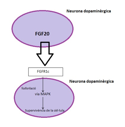 esquema on es pot veure l'interacció de FGF20 a les neurones dopaminèrgiques